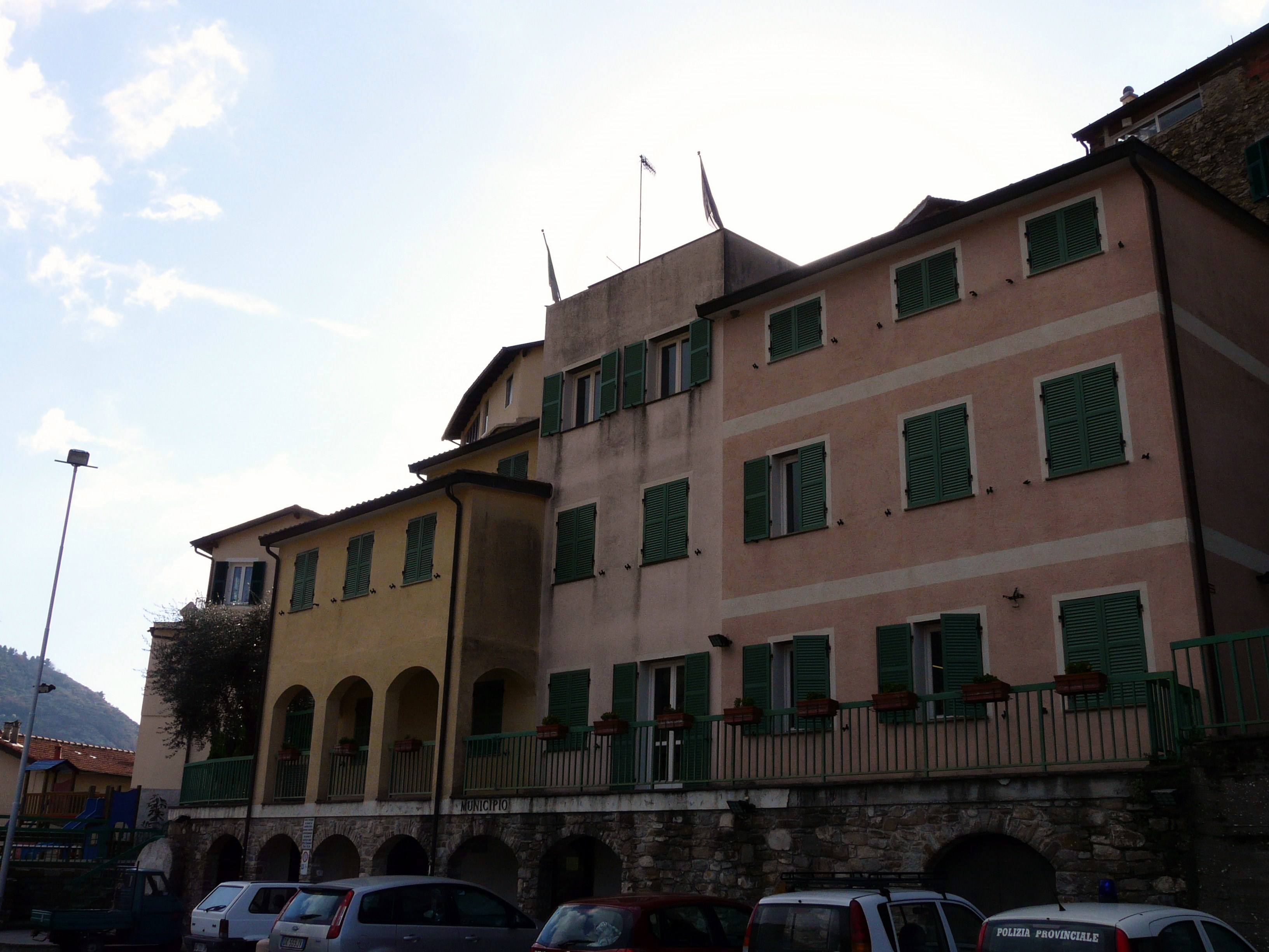 Municipio di San Biagio della Cima, Liguria, Italia